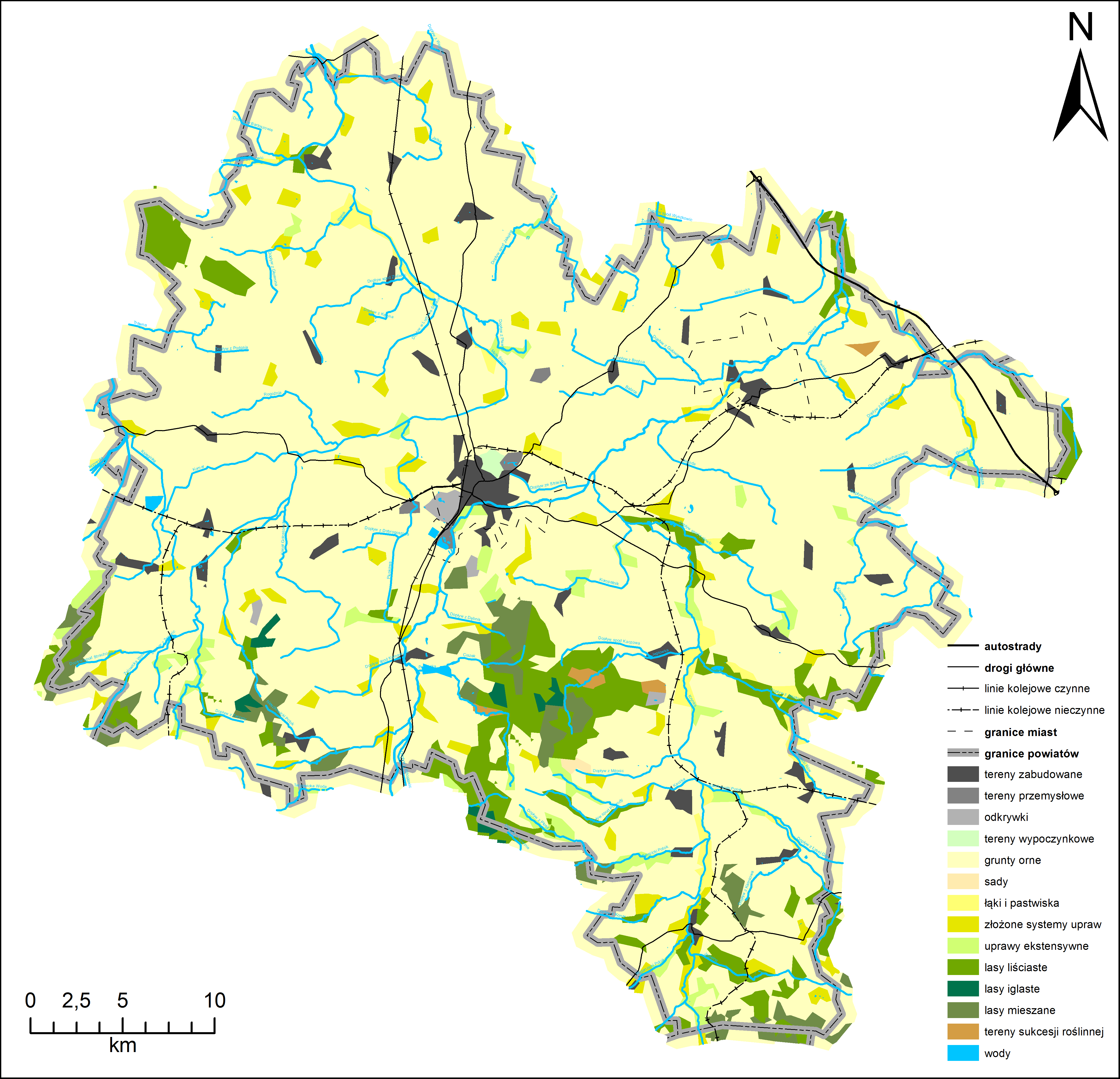 Pokrycie terenu powiatu strzelińskiego w 2006 roku